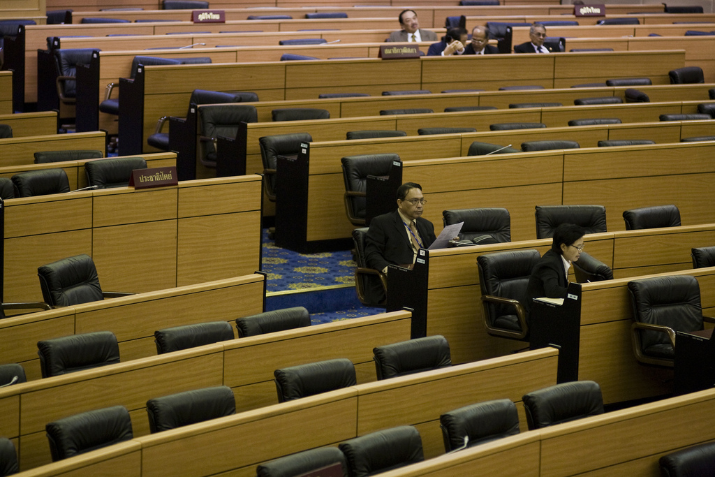 ณ อาคารรัฐสภา ถนนอู่ทองใน 17กันยายน2553 (The Official Site of The Prime Minister of Thailand Photo by พีรพัฒน์ วิมลรังครัตน์)